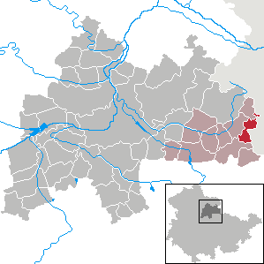 Eßleben-Teutleben in Thuringia - District Sömmerda